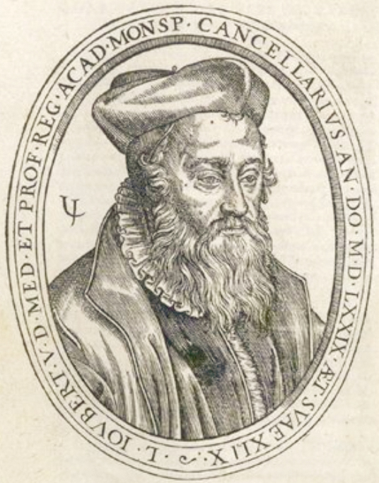 Frontispice de Traité du ris